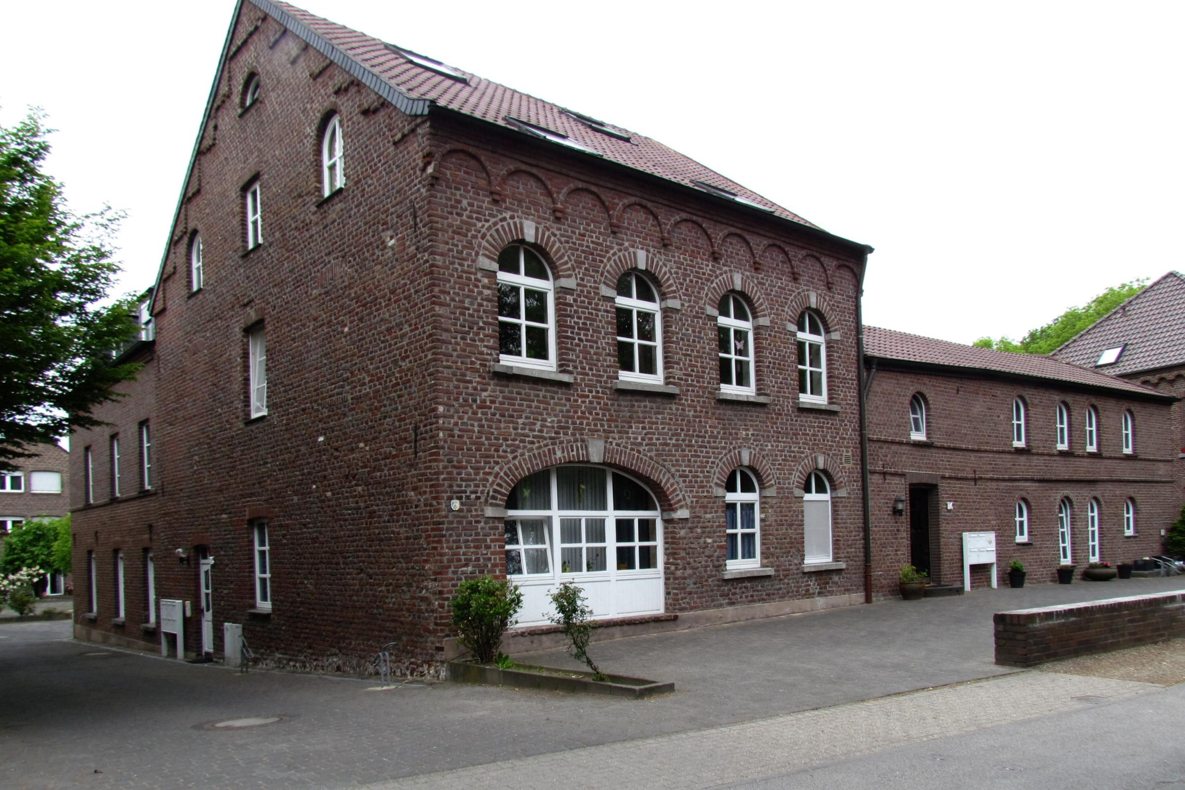 Die Nelsenmühle Strassenansicht